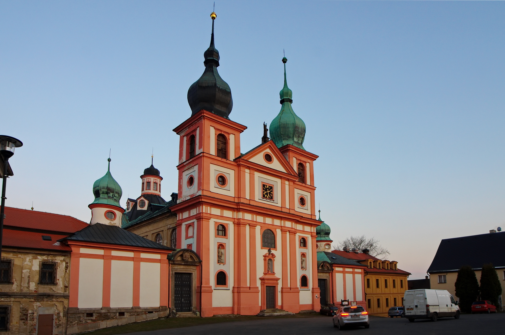 Proboštství svaté Maří Magdalény, nám. J. W. Goetheho 1, Chlum Svaté Maří.